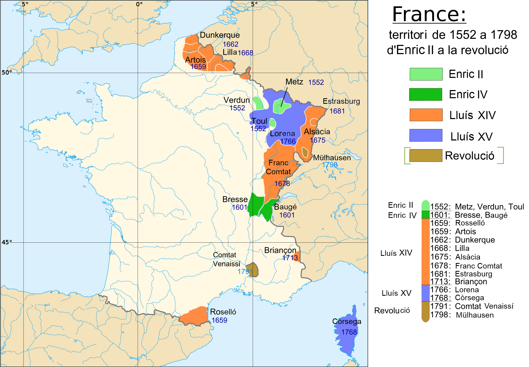 França, de l'any 1552 fins a la Revolució Francesa. Hi hagueren quatre reis entre aquests anys: Enric II, Enric III, Lluís XIV i Lluís XV.